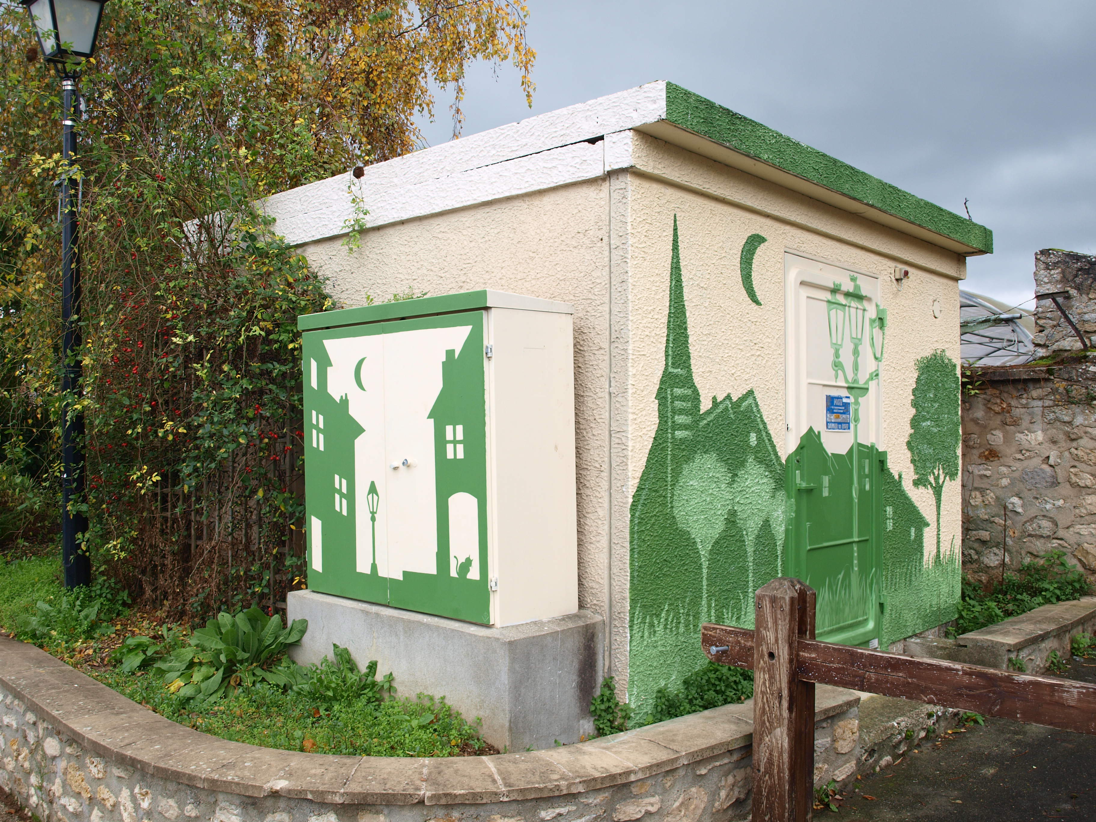 Servon (Seine-et-Marne) ; le transformateur électrique de la place du centre historique.